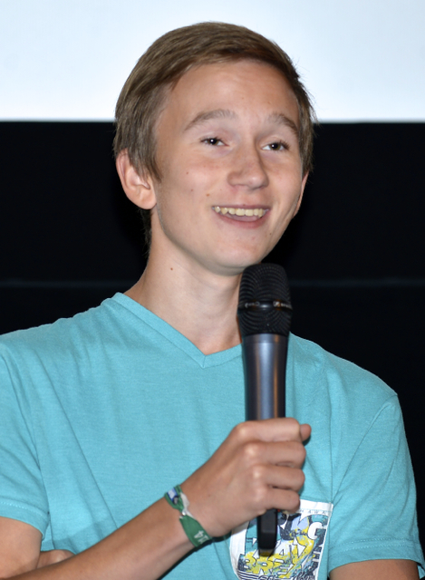 Lukas Holgersson under presentationen av den Svenska filmhösten 2014 i Filmhuset i Stockholm den 18 augusti 2014.